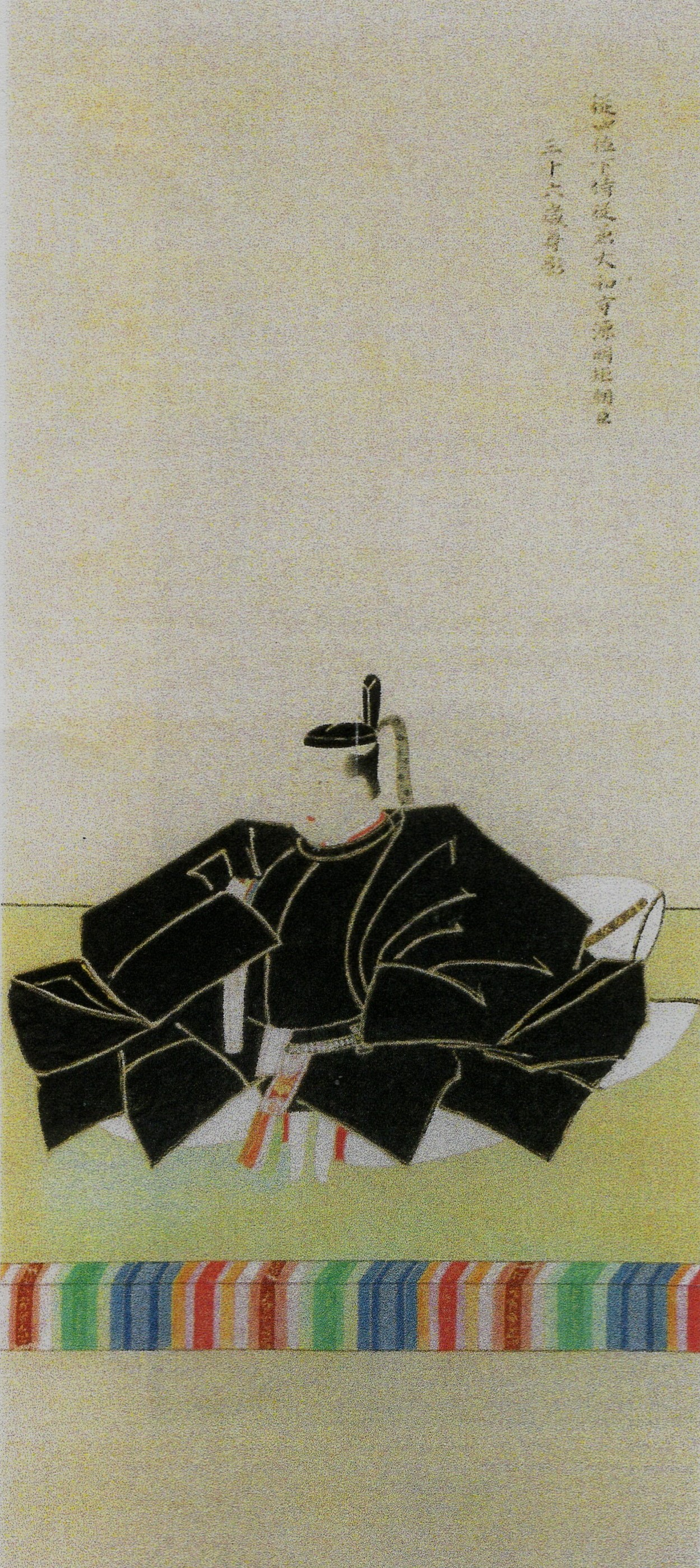 松平明矩(義知)の肖像。